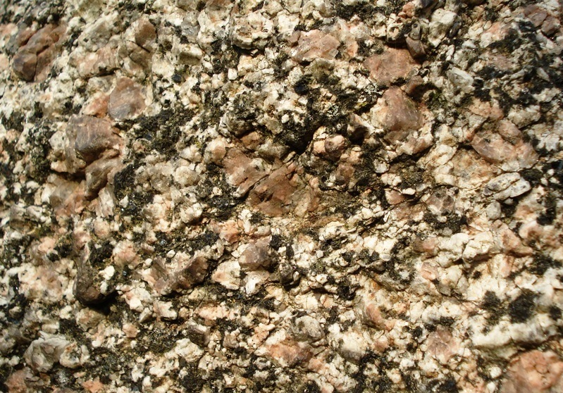 Duevelstein-Teufelsstein-Grosskoenigsfoerde - Granit